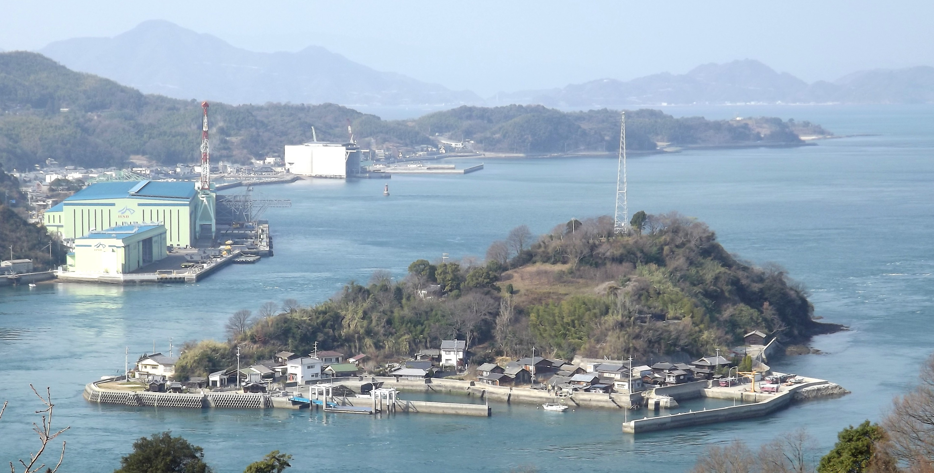 来島（愛媛県今治市）